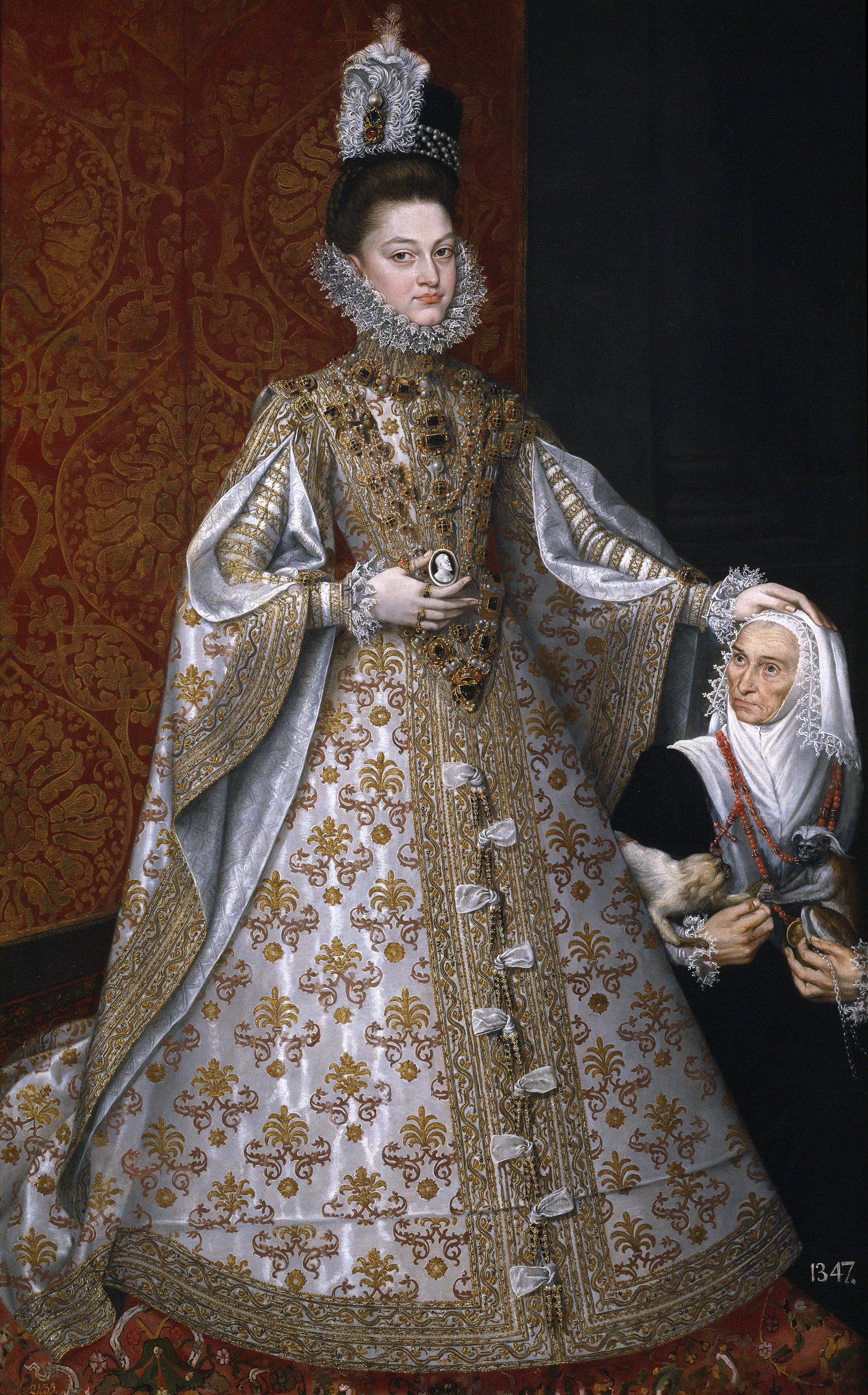 Retrato de la infanta Isabel Clara Eugenia (1566-1633), que fue hija del rey Felipe II de España, esposa del archiduque Alberto de Austria y también soberana y posteriormente gobernadora de los Países Bajos.